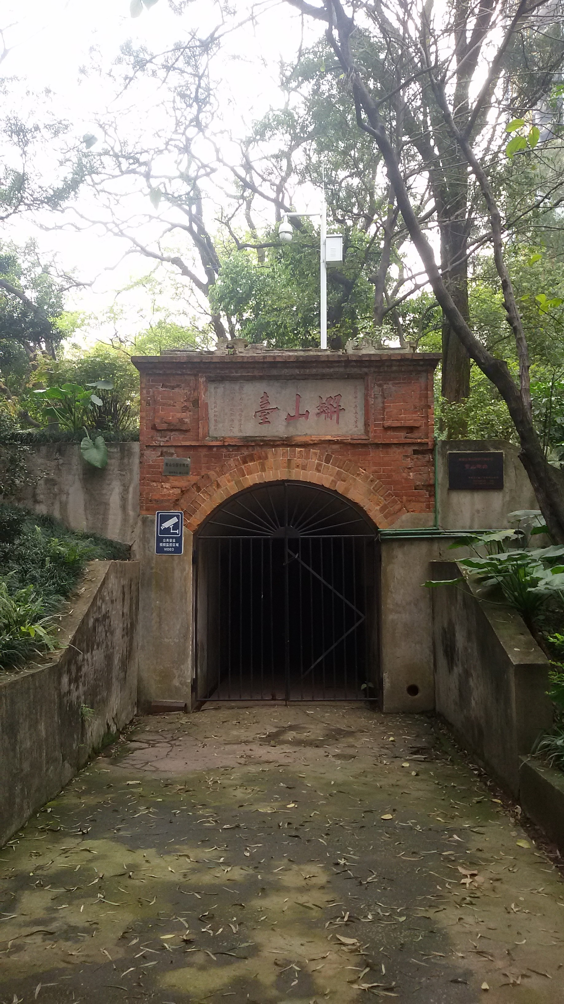 粵語: 黃埔蠏山砲臺